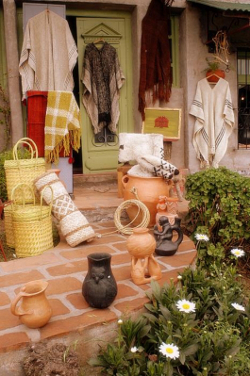 El arte autóctono argentino se manifiesta ya sea a través de telares, cerámica y cestería, entre otros.